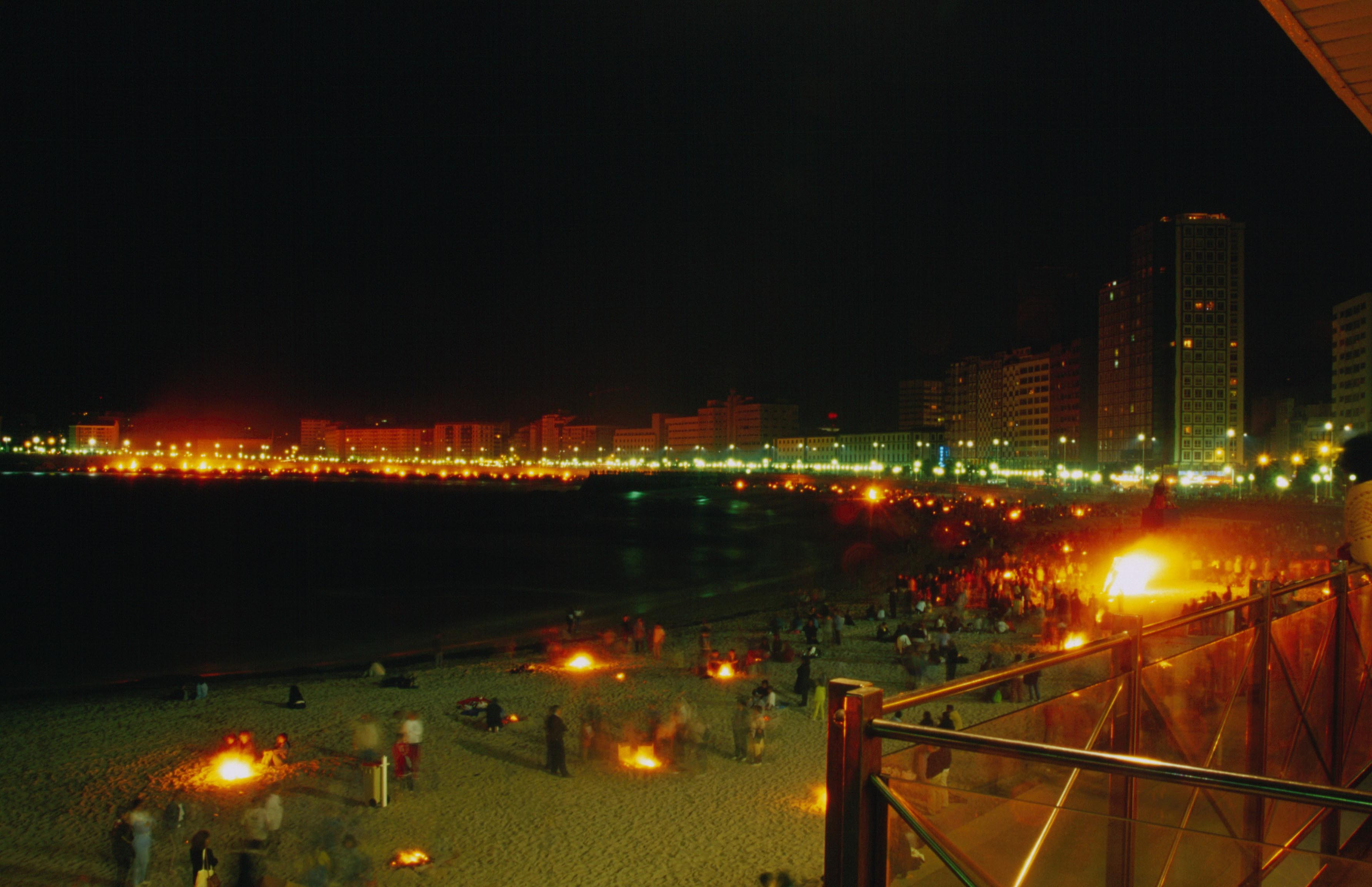 Hogueras de San Juan en la playa de Riazor